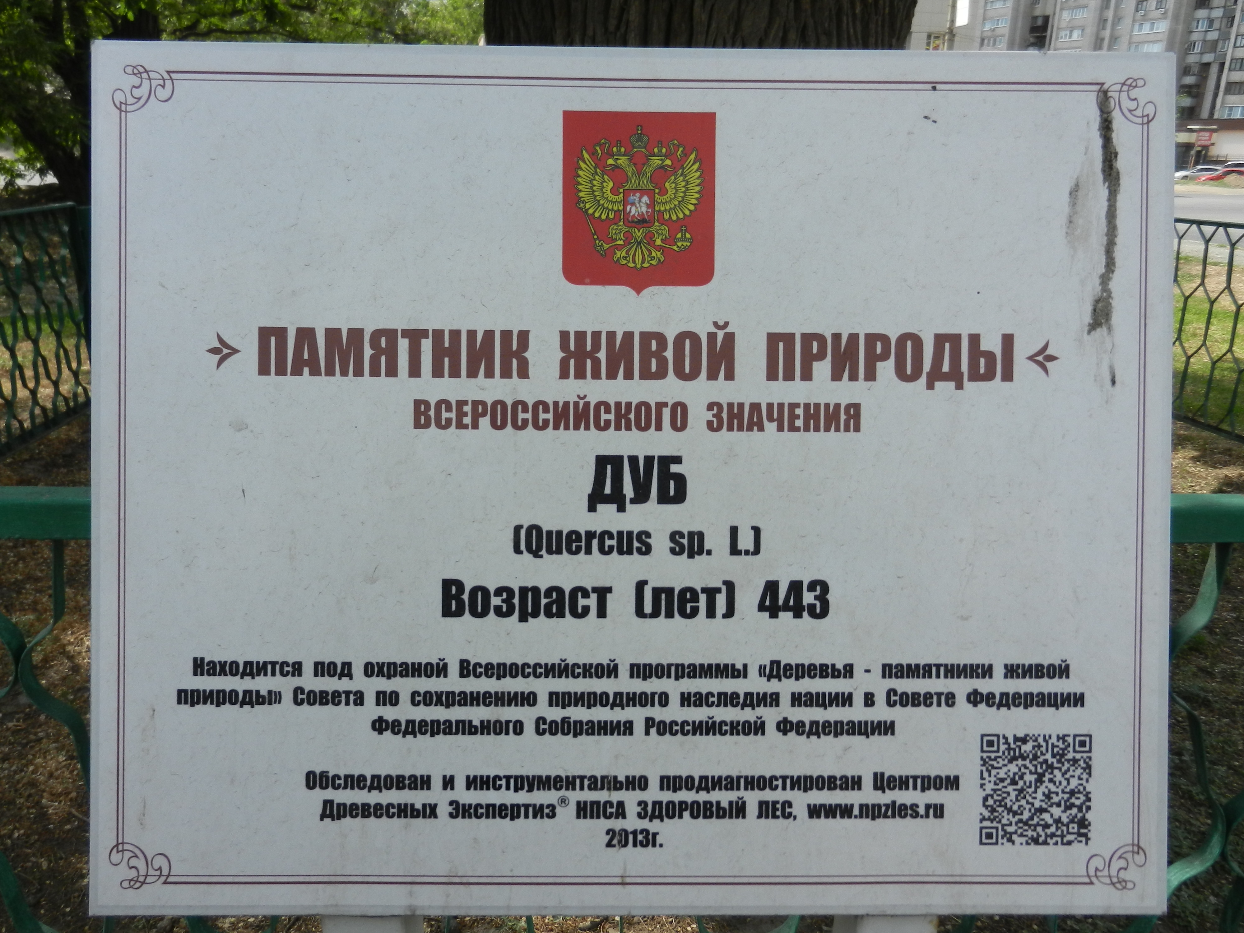 Дуб черешчатый: ул. Генерала Герасименко, Астрахань, Астраханская область This image is related to the protected area of Russia number 3090075